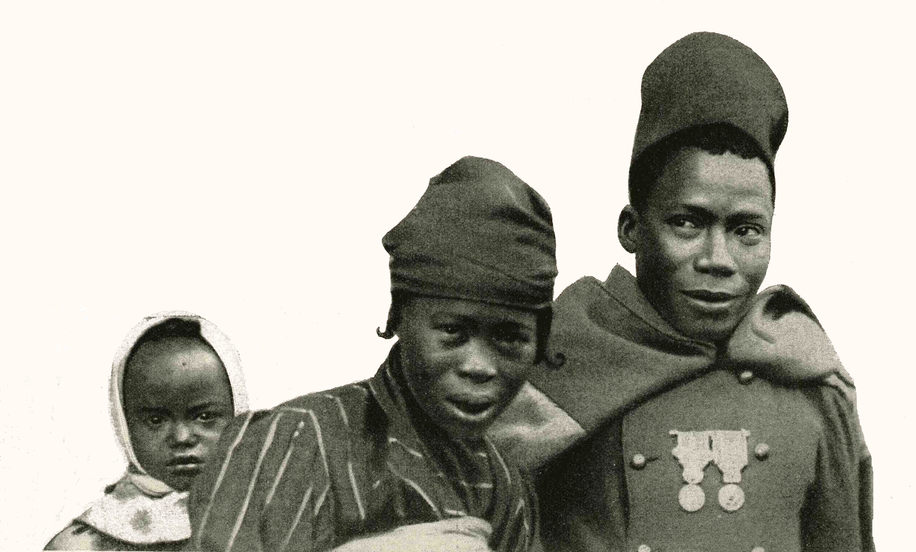 Tirailleur sénégalais et sa famille à Marseille fin l913. Les recrues s'acclimatant difficilement aux rigueurs du climat (températures descendant jusqu'à -40°), ils sont sur le point d'être renvoyés dans leur pays.